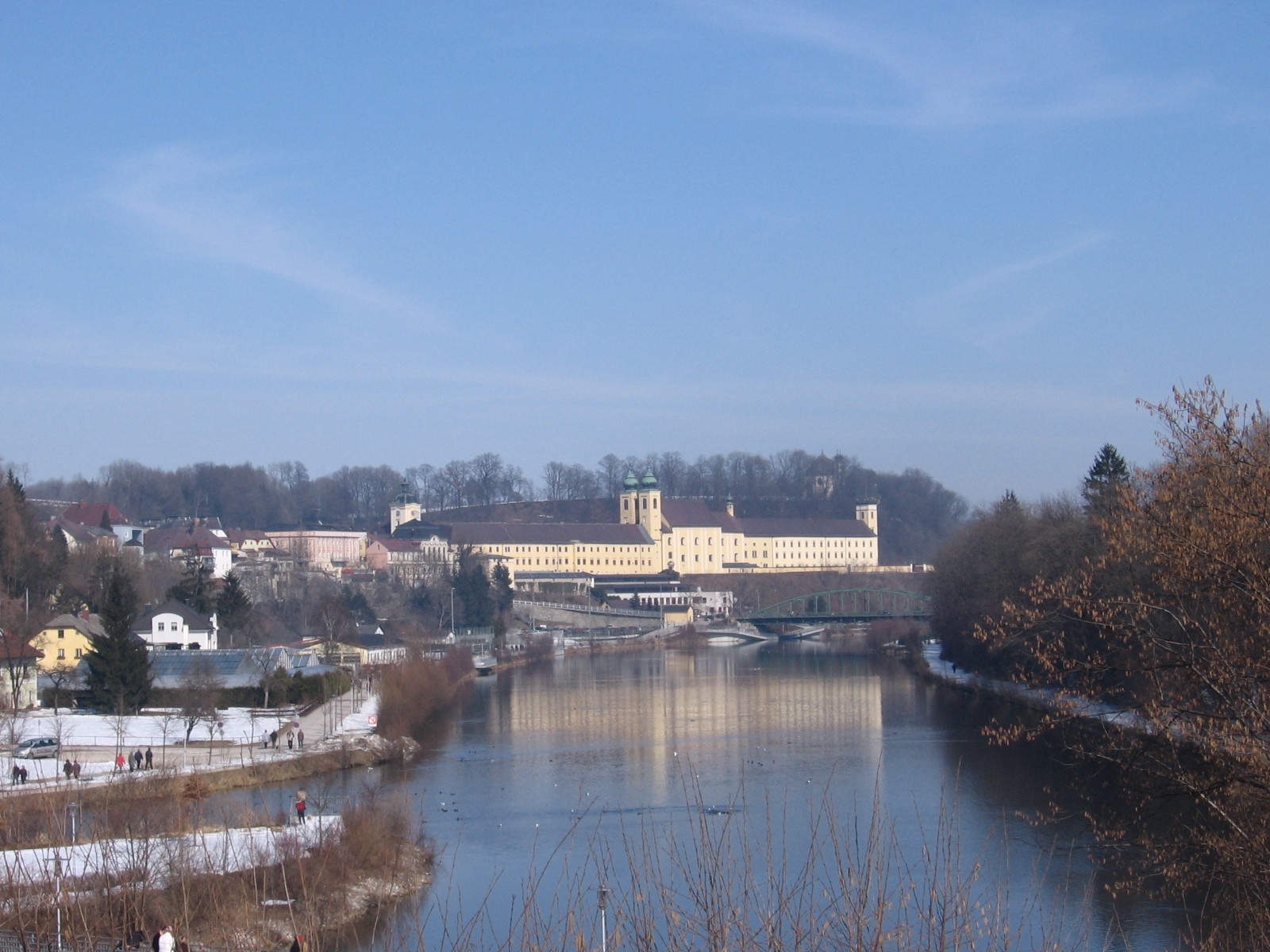 Sicht von der Paurakirche auf das Stift Lambach Sonstiges:Ich habe das Bild selbst geschossen